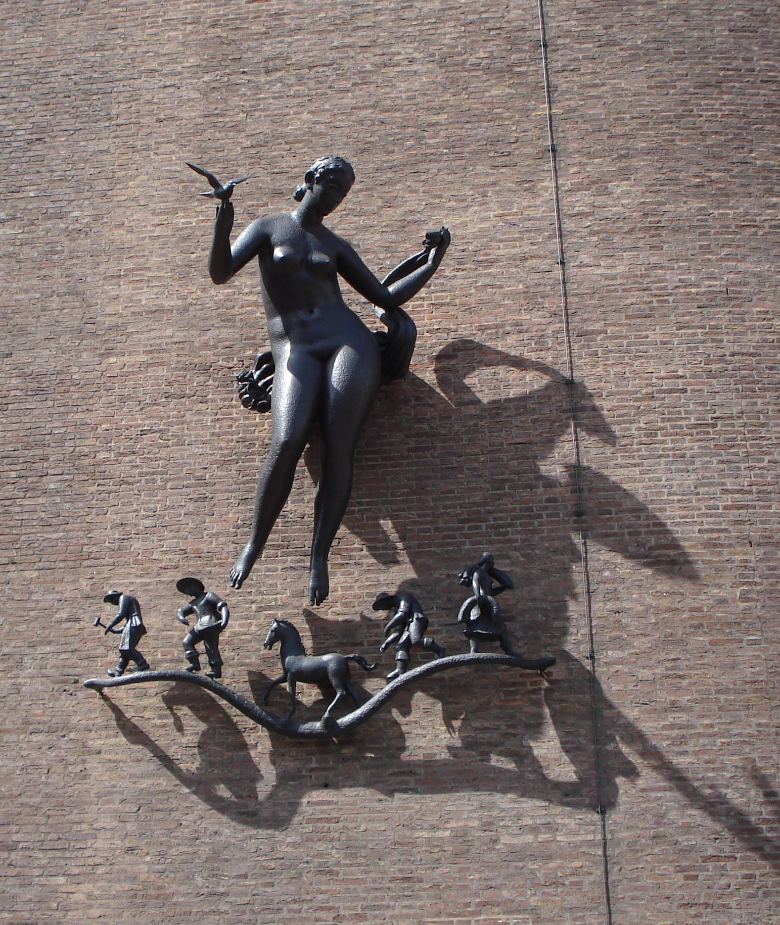 Rotterdam, Coolsingel (voorheen aan de Blaak). Kunstwerk "Vrede en Welvaart". Informally known as "het Nakie van Blakie". The Netherlands.